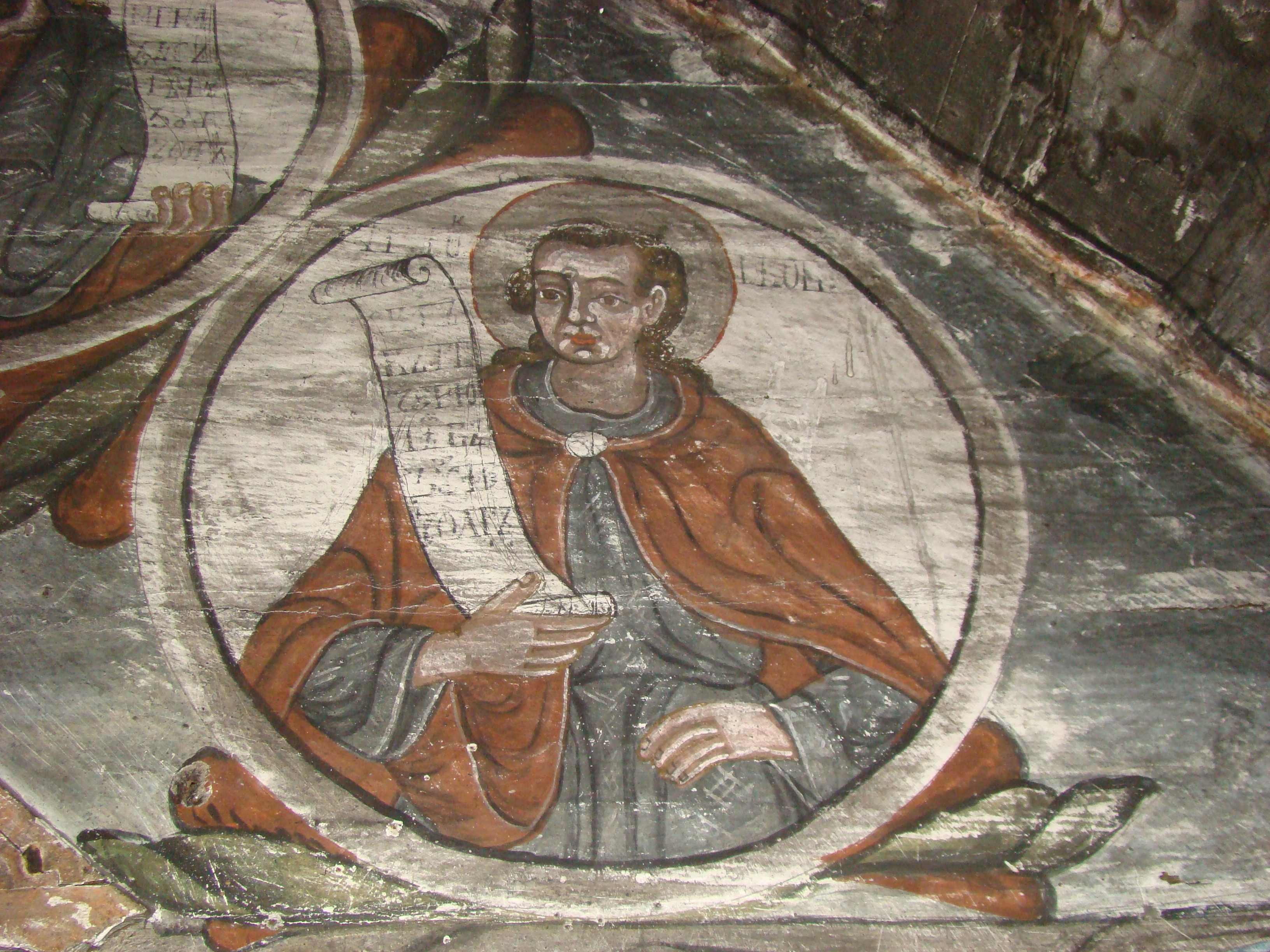 Biserica de lemn „Cuvioasa Paraschiva” din Rădulești